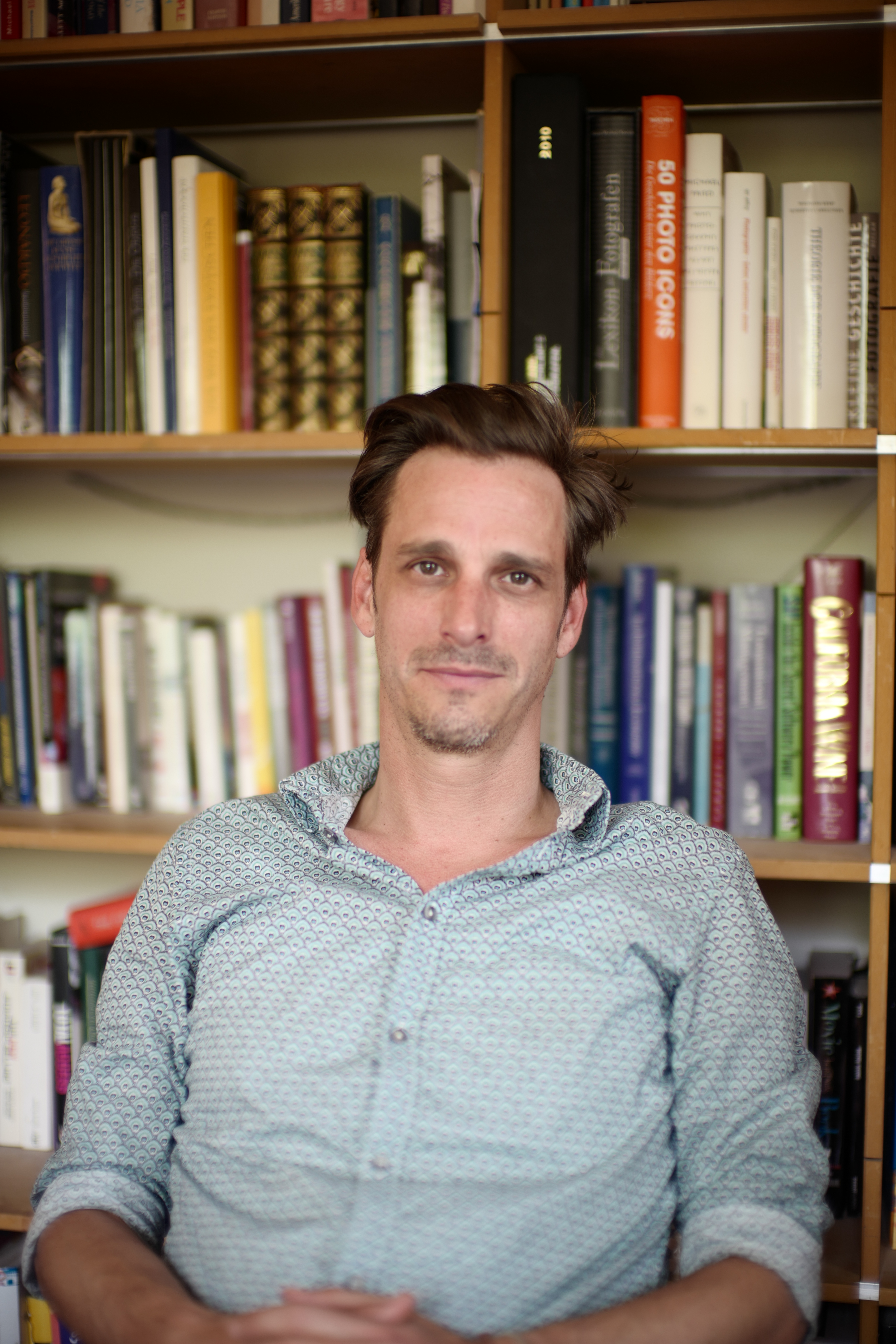 Autor, Musiker, Schauspieler